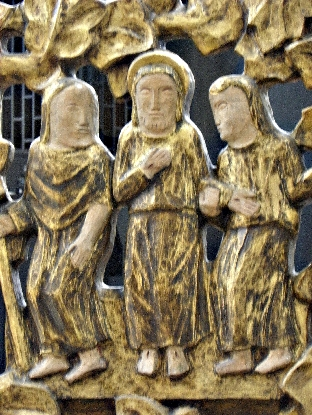 lettner, jesus christus, emmaus, unikirche marburg